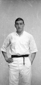 José Aramendi (Felipe) in 1937